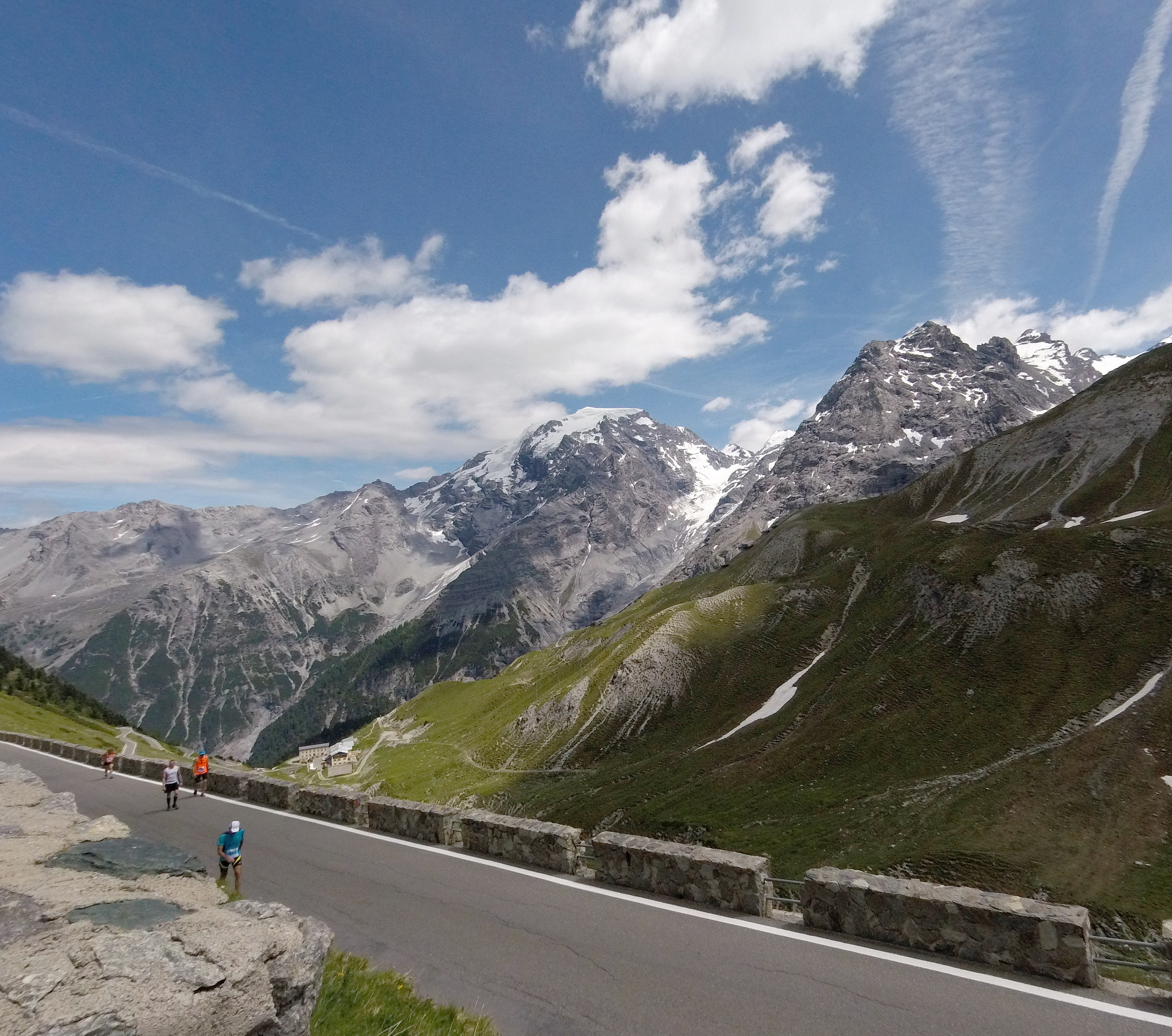 Stelvio Marathon 2017, auf der Strecke bei ca km 39